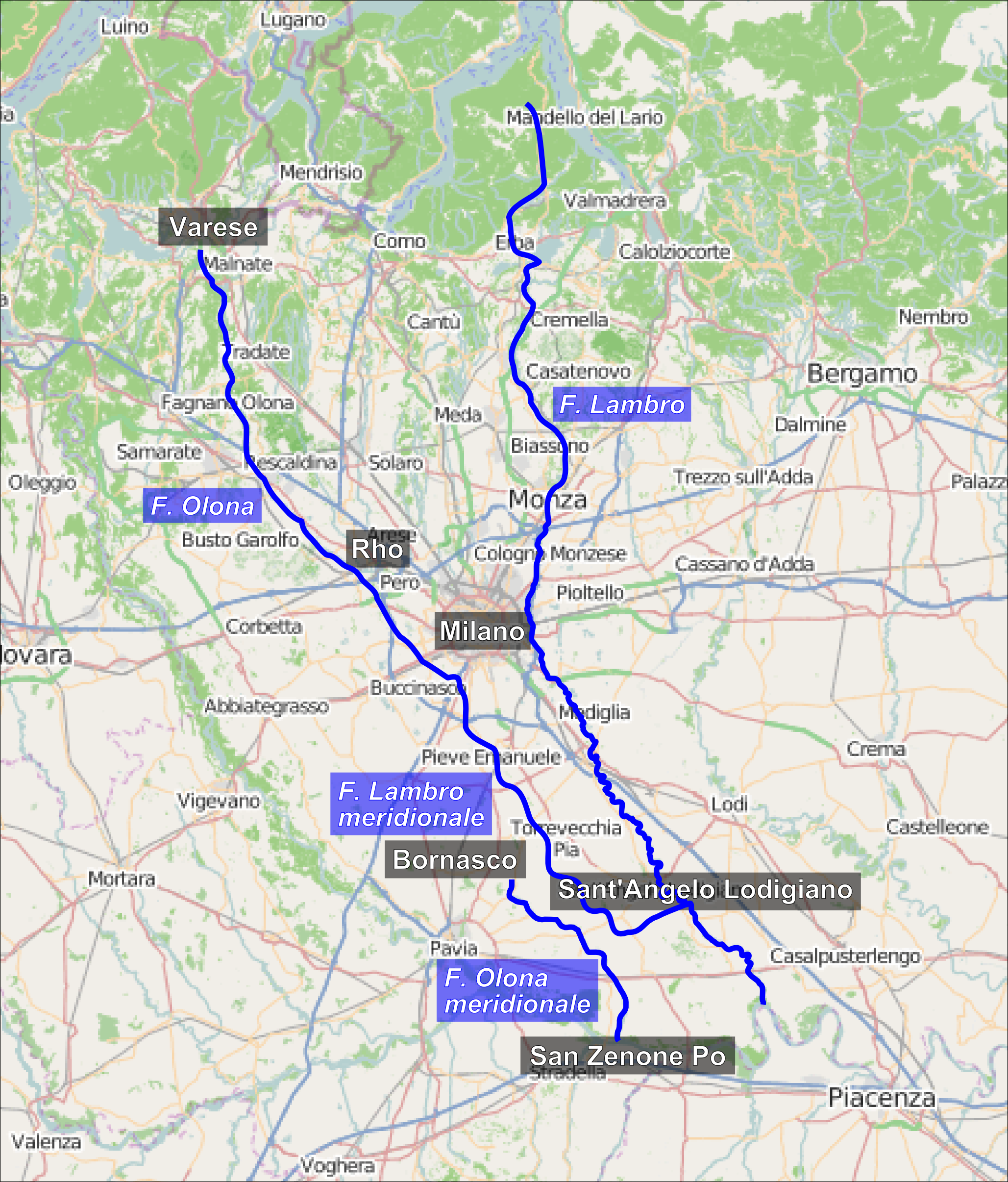 Percorsi evidenziati dei fiumi Olona, Olona meridionale, Lambro e Lambro meridionale sovrapposti ad una mappa ottenuta da Open street map.